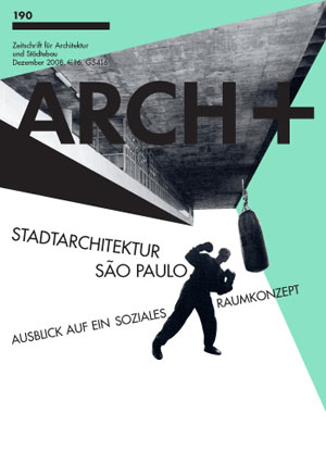 Cover der Zeitschrift ARCH+ Nr. 190